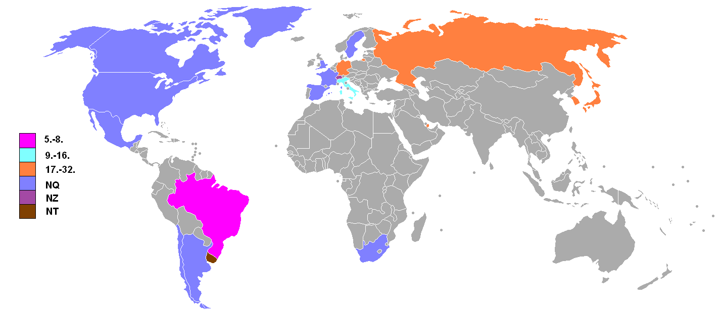 Beste Platzierungen der costa-ricanischen Mannschaft in den Austragungsländern der FIFA-Fußballweltmeisterschaften